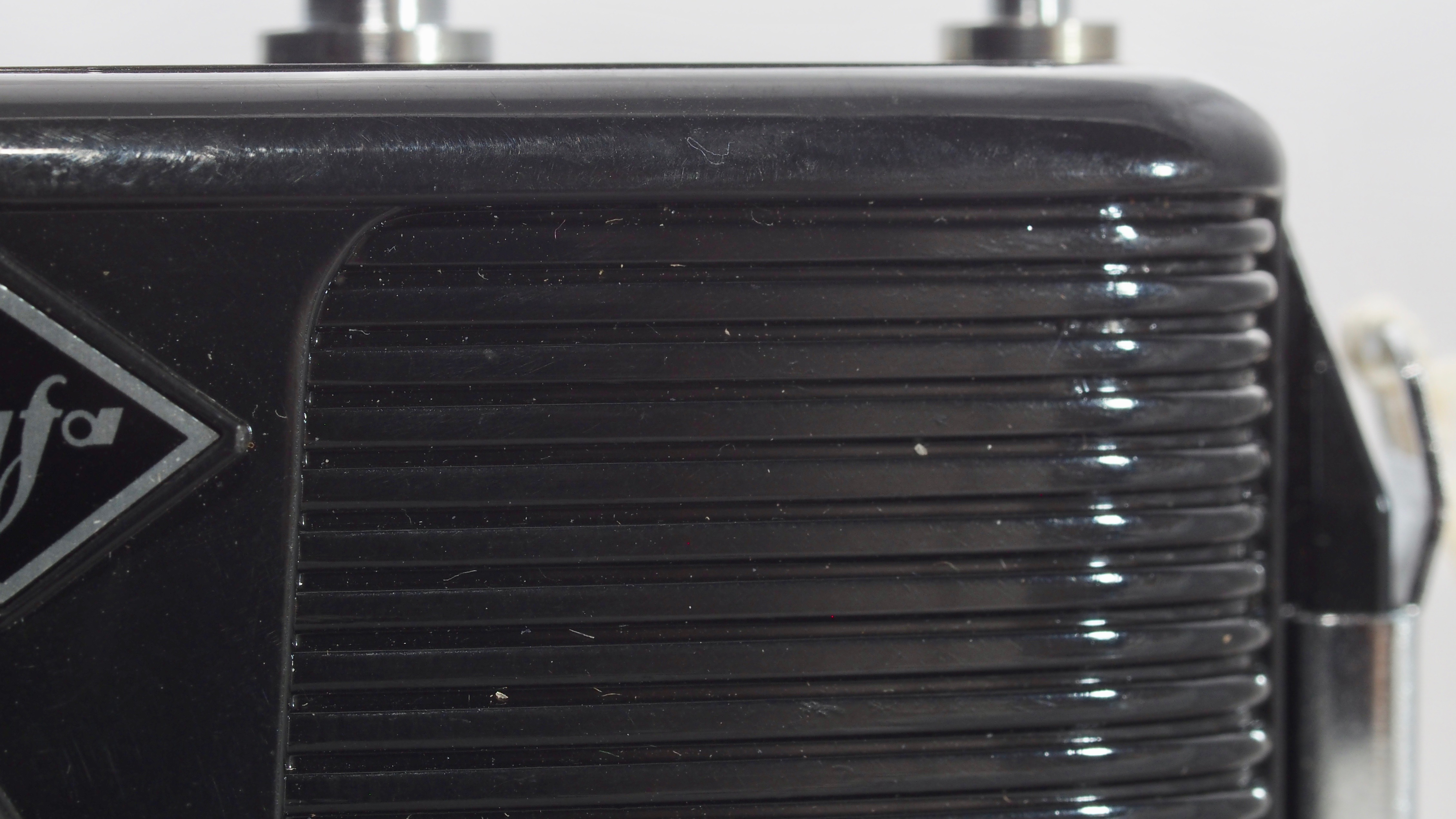 Click Oberfläche waagrechte Streifen